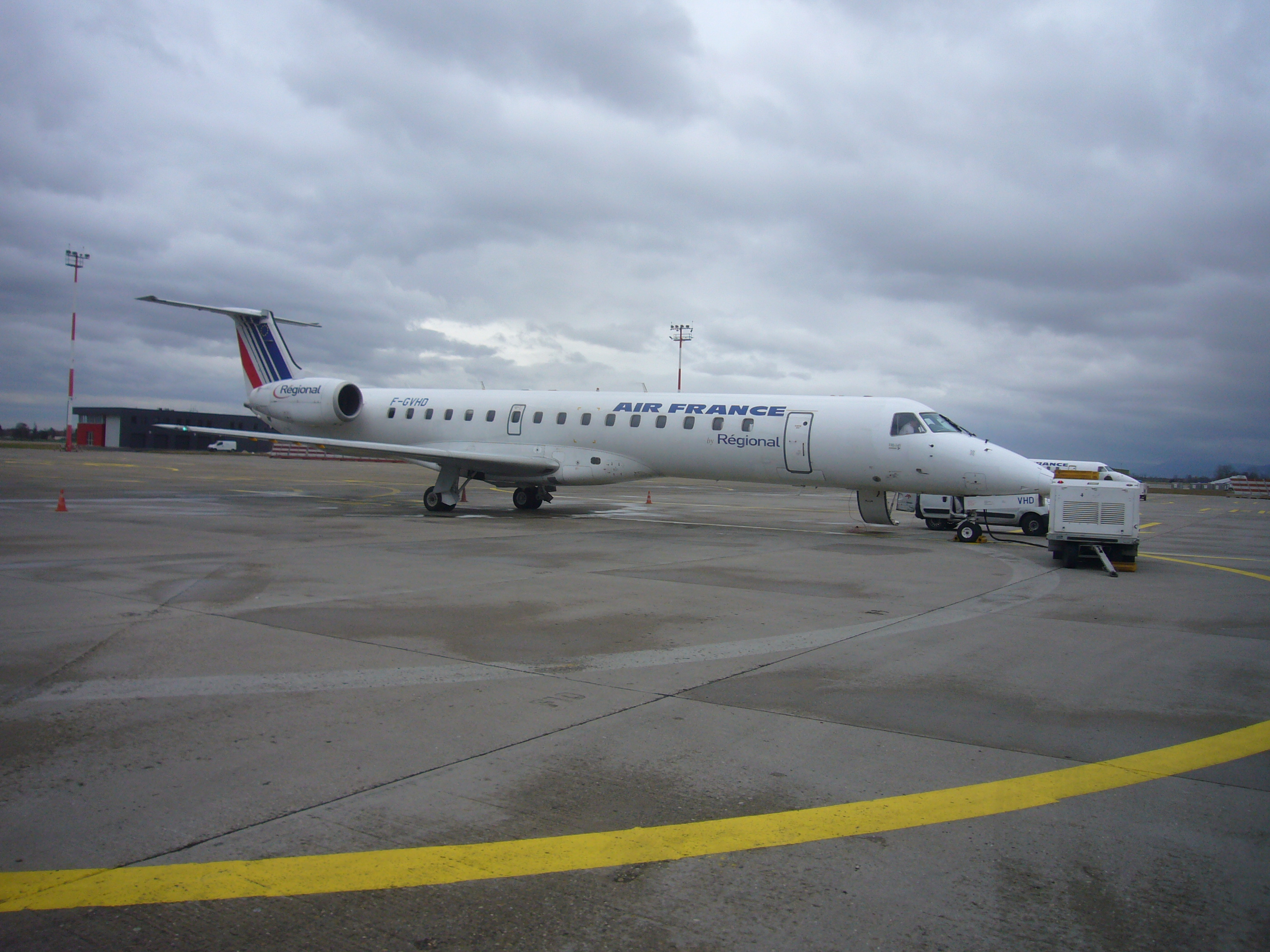 Embraer 145 sur le tarmac de l'aéroport de Strasbourg.